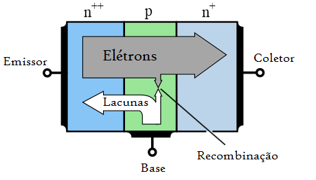 Esquema de Transistor NPN, como indicações em português.